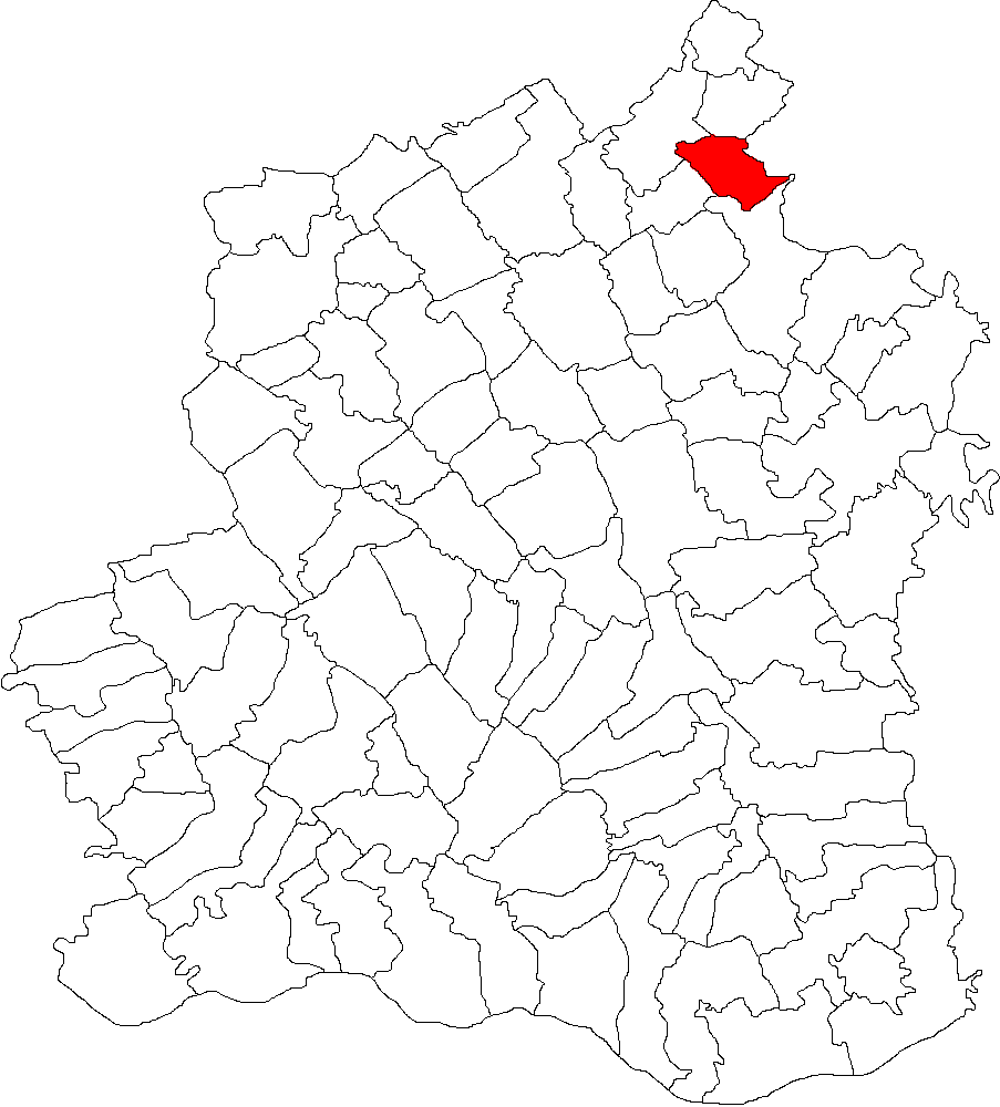 Categorie:Hărţi ale judeţului Teleorman